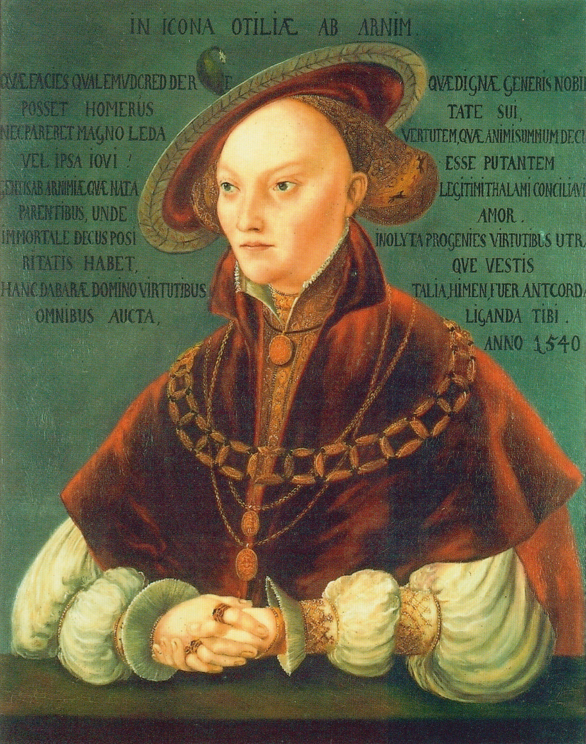 Portrait von Ottilie von Arnim; Kopie nach einem Gemälde der Cranach-Schule.